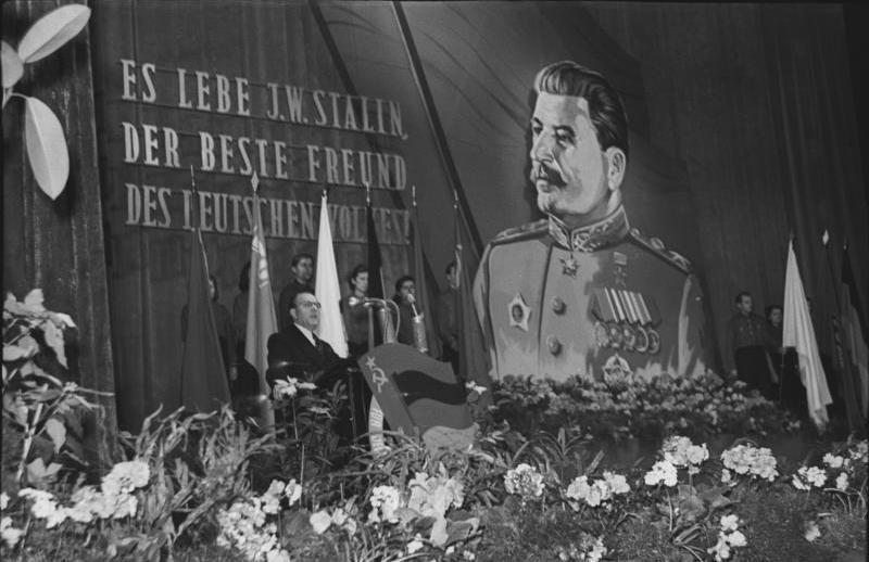 Festansprache Grotewohl zum Stalin-Geburtstag Illus/Rudolph 21.12.1950 Festveranstaltung zum 71. Geburtstag von J.W. Stalin in der Staatsoper Berlin Am Abend des 21. Dezember 1950 fand in der Staatsoper in Berlin die zentrale Festveranstaltung zu Ehren des 71. Geburtstages von J.W. Stalin statt, auf der Ministerpräsident Otto Grotewohl sprach. UBz: Ministerpräsident Otto Grotewohl während der Festansprache. [Berlin, Staatsoper.- Festakt zum Geburtstag von Josef Stalin, mit Zeichnung von Stalin und Inschrift "Es lebe J.W. Stalin, der beste Freund des deutschen Volkes!"] Abgebildete Personen: Grotewohl, Otto: Ministerpräsident, stellvertretender Staatsratsvorsitzender, DDR